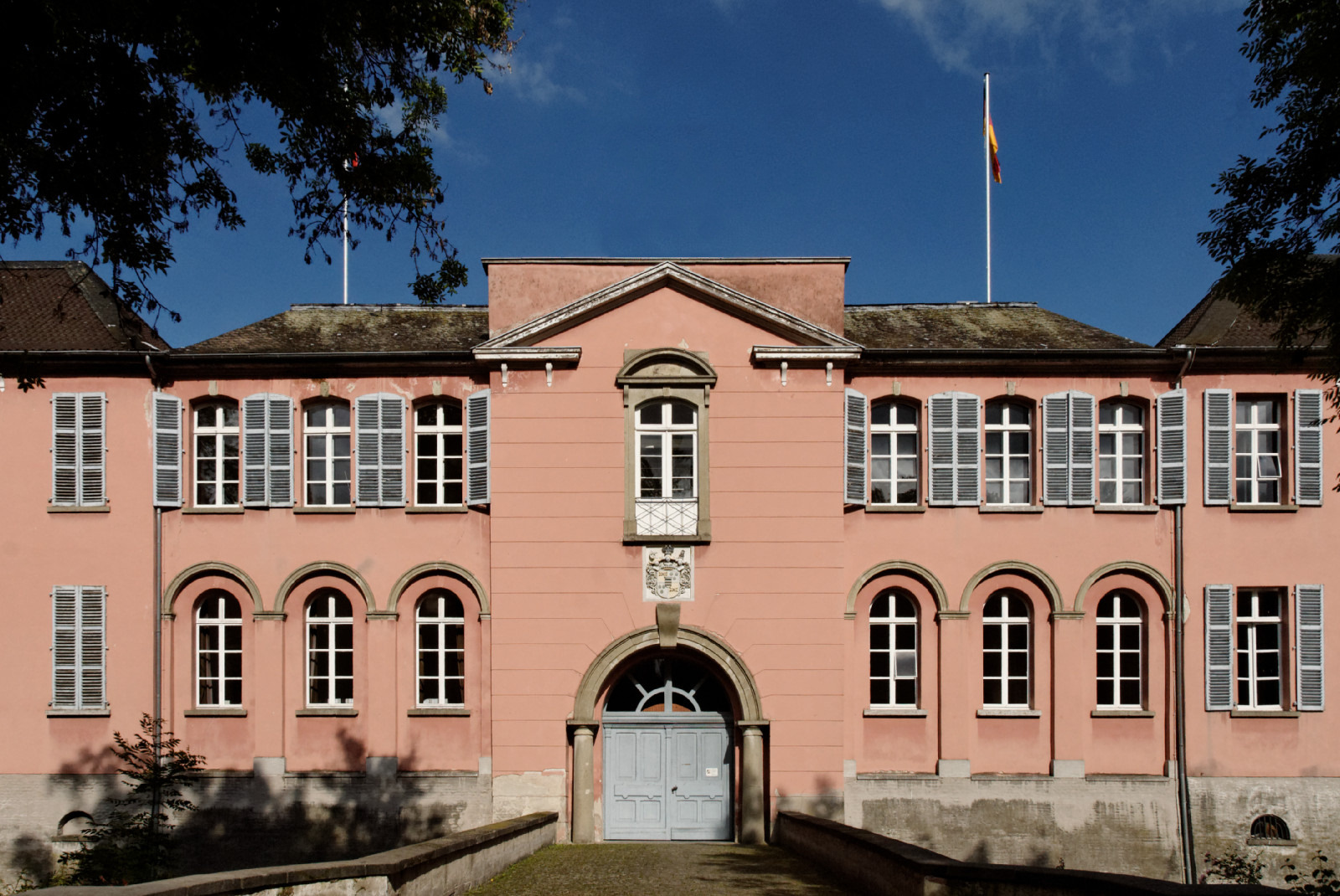 Portal des Schlosses Kalkum, Zustand 2014